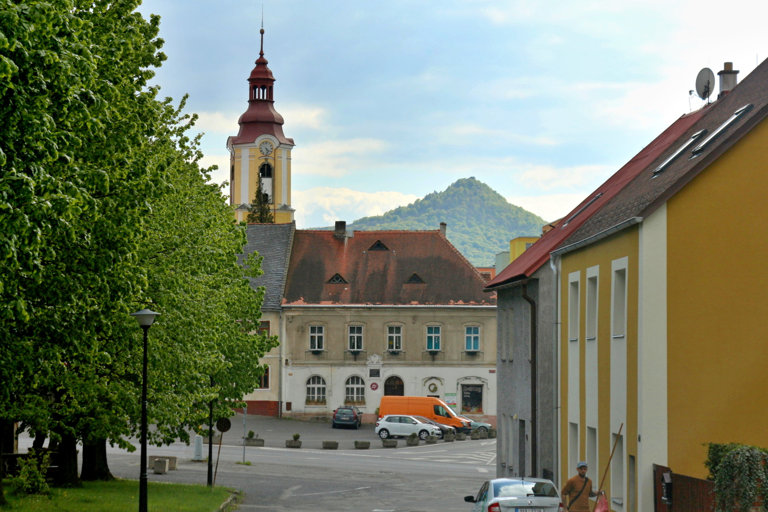 Stráž pod Ralskem nám. 5. května